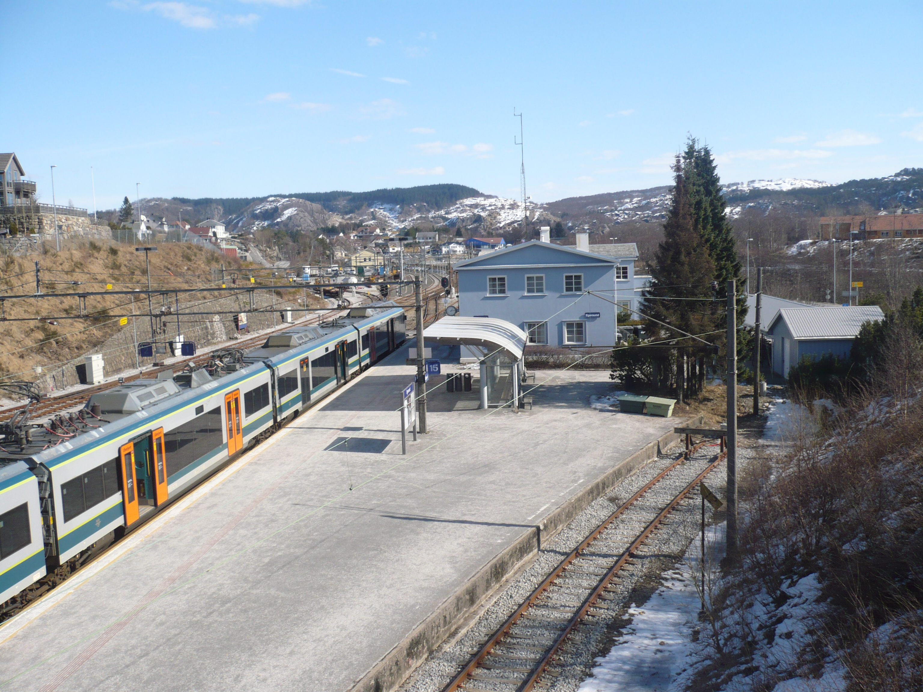 Jernbanestasjonen i Egersund